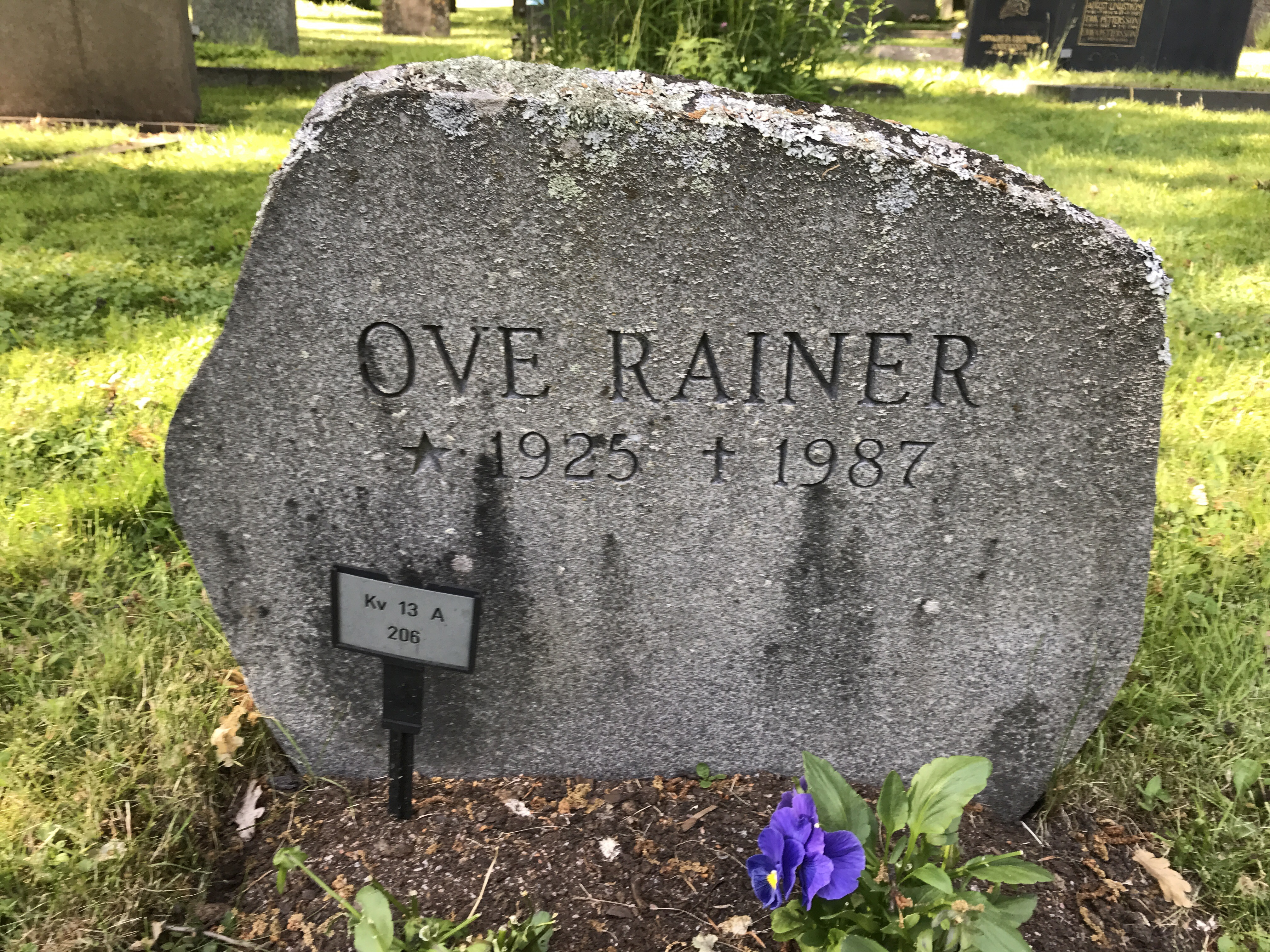 Kv 13 206 Svenska Gravar